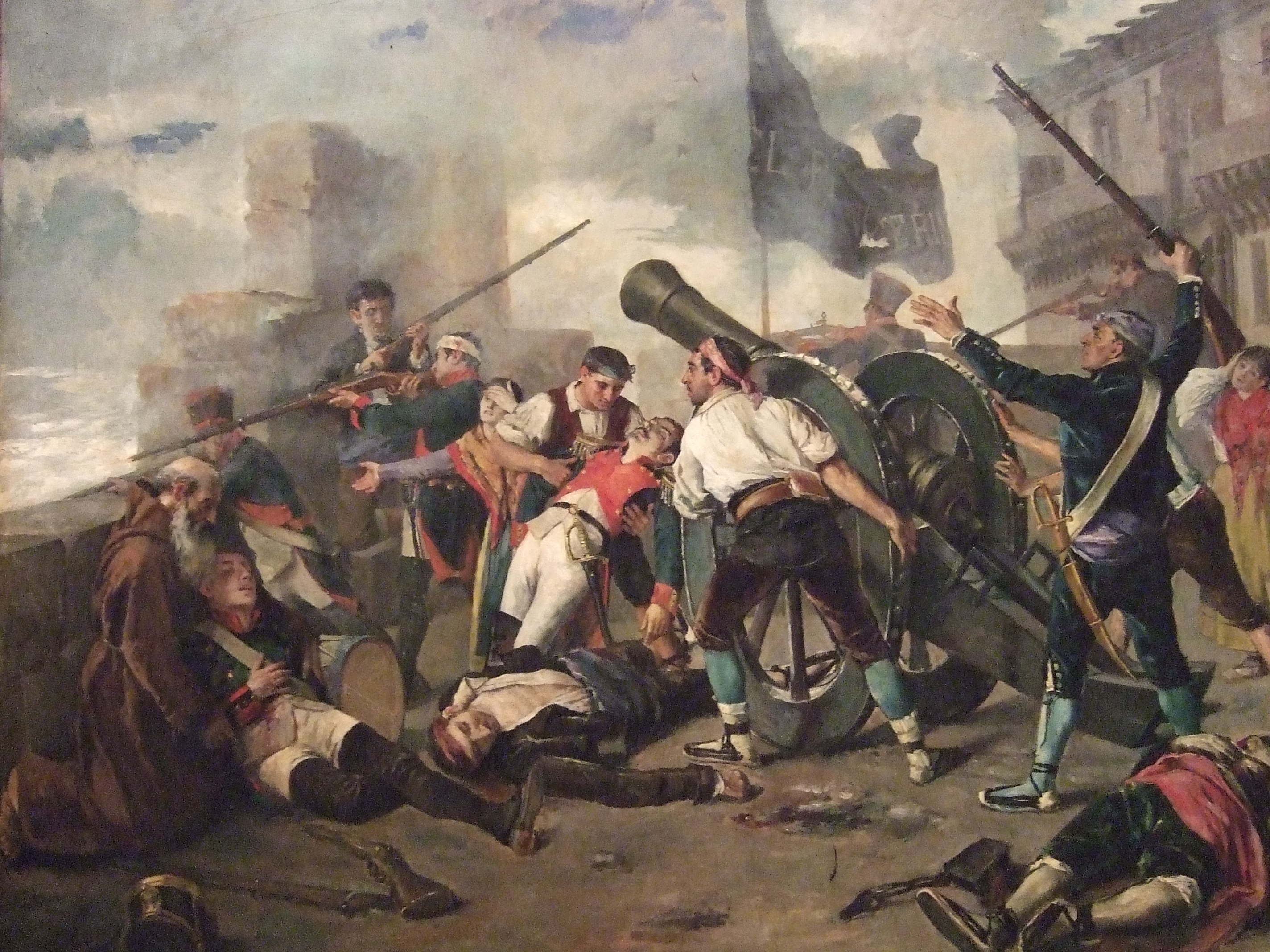 La obra representa el momento en que los habitantes de Zaragoza, tras ser intimados por los soldados franceses a que depusieran las armas, y hallándose entre la iglesia de San Juan de los Panetes y la Catedral-Basílica de Nuestra Señora del Pilar, enarbolaron una bandera negra con el lema «El Pilar no se rinde».